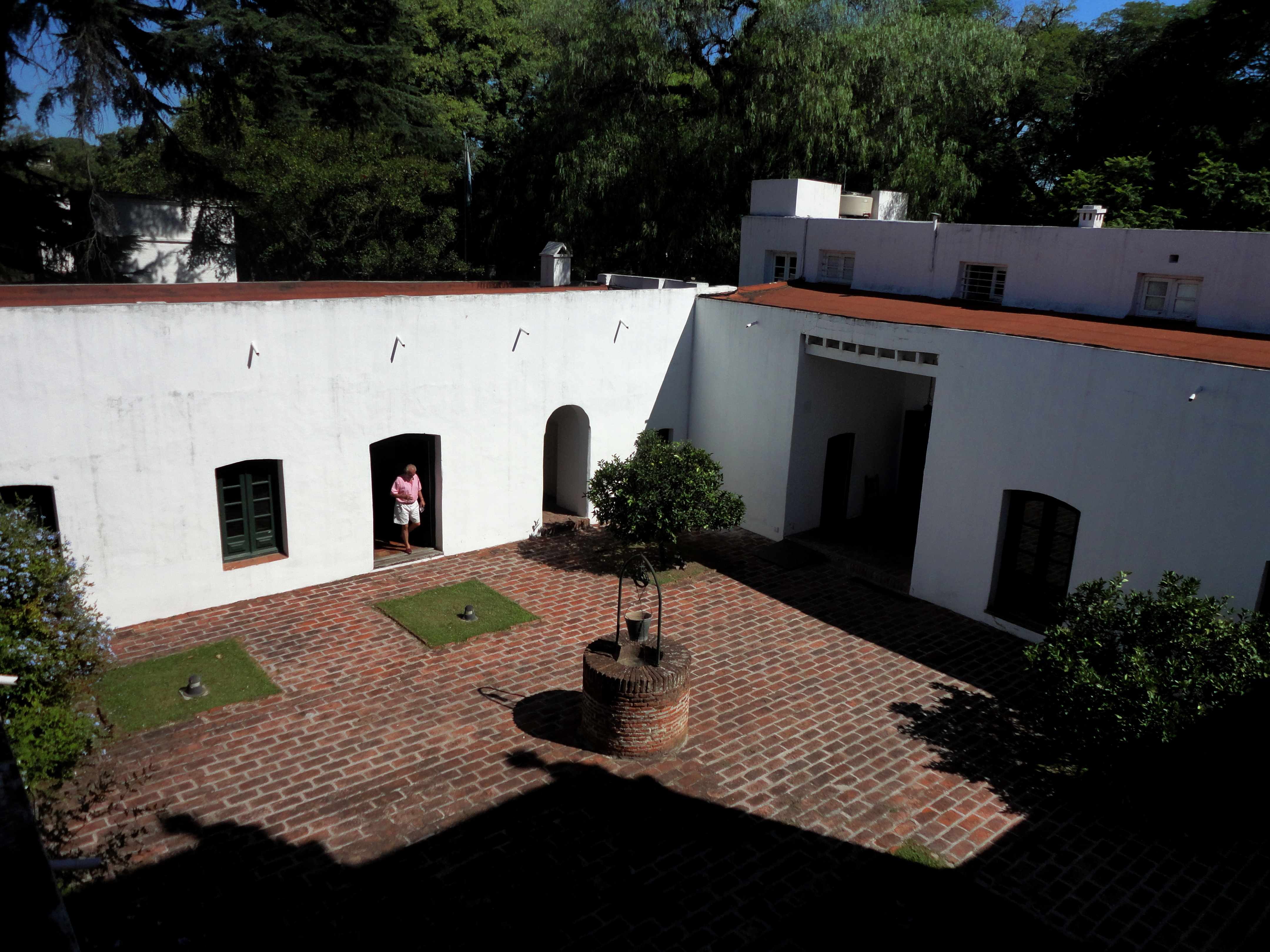 Casa quinta que perteneció a Juan Martín de Pueyrredón. Actualmente es el Museo Pueyrredón